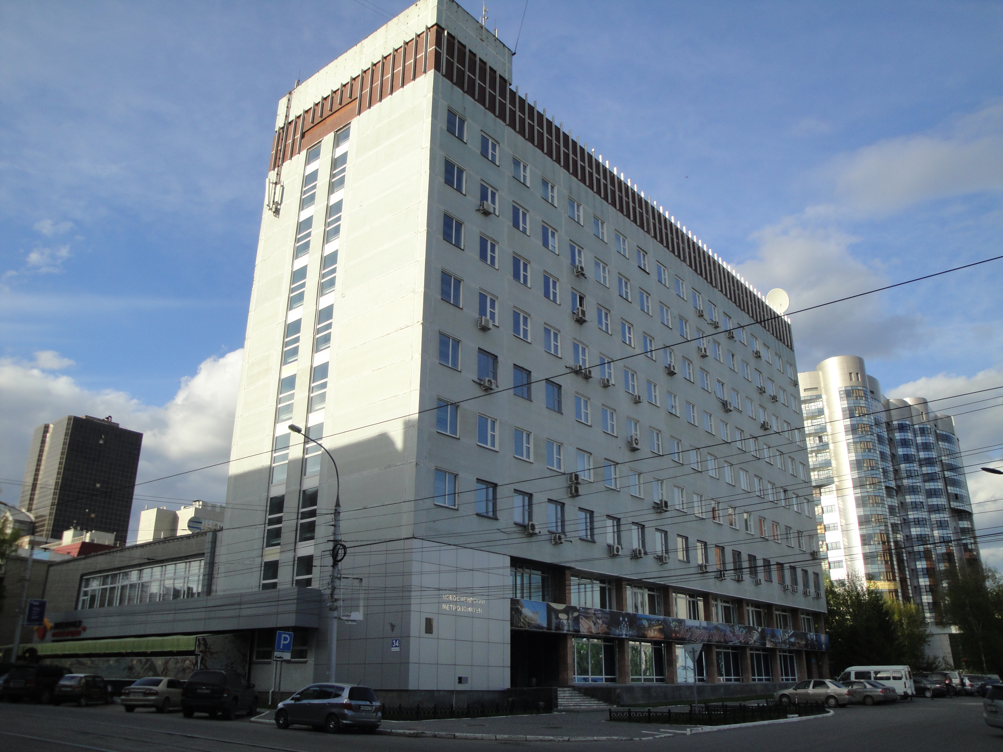 Новосибирский метрополитен. Здание управления, торец